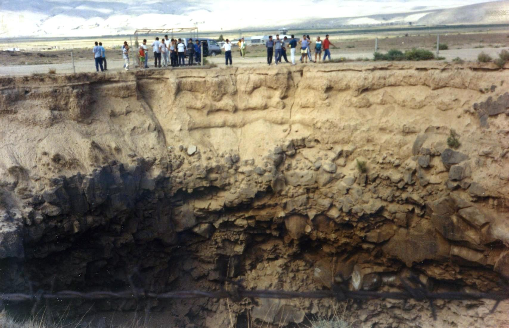 Meteor Deep from Igdir